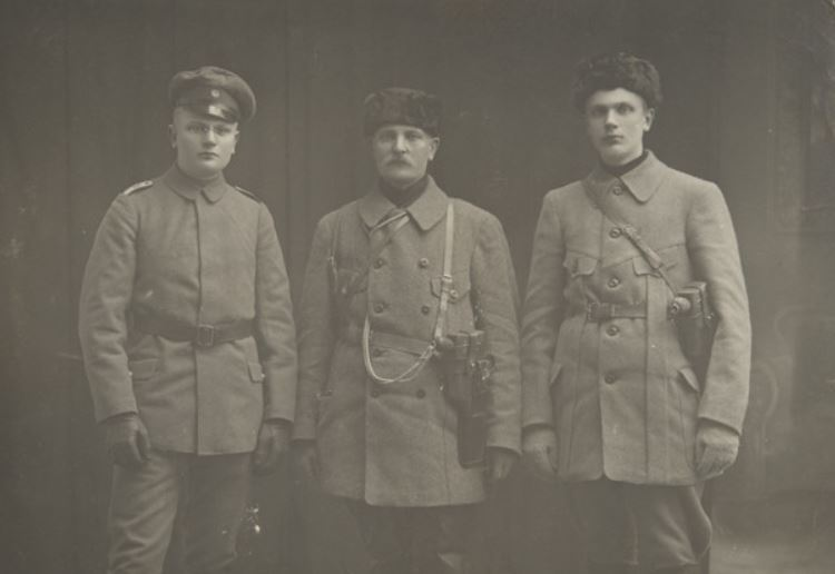 Lapuan suojeluskunnan päällikkö Matti Laurila (kesk.) ja poikansa Matti vas. ja Ilmari 1.3.1918